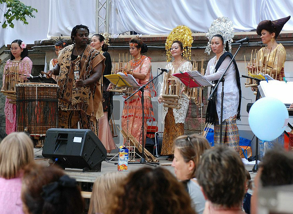 Die Angklung-Gruppe Nusantara auf dem Museumsuferfest in Frankfurt auf der Bühne des Museums für Weltkulturen zusammen mit einem senegalesischen Trommler.